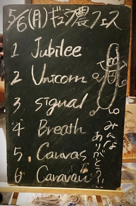 amiinAセトリボード